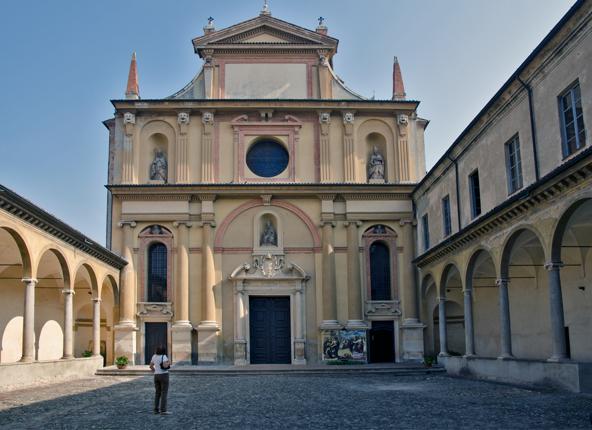 San Sisto Facciata